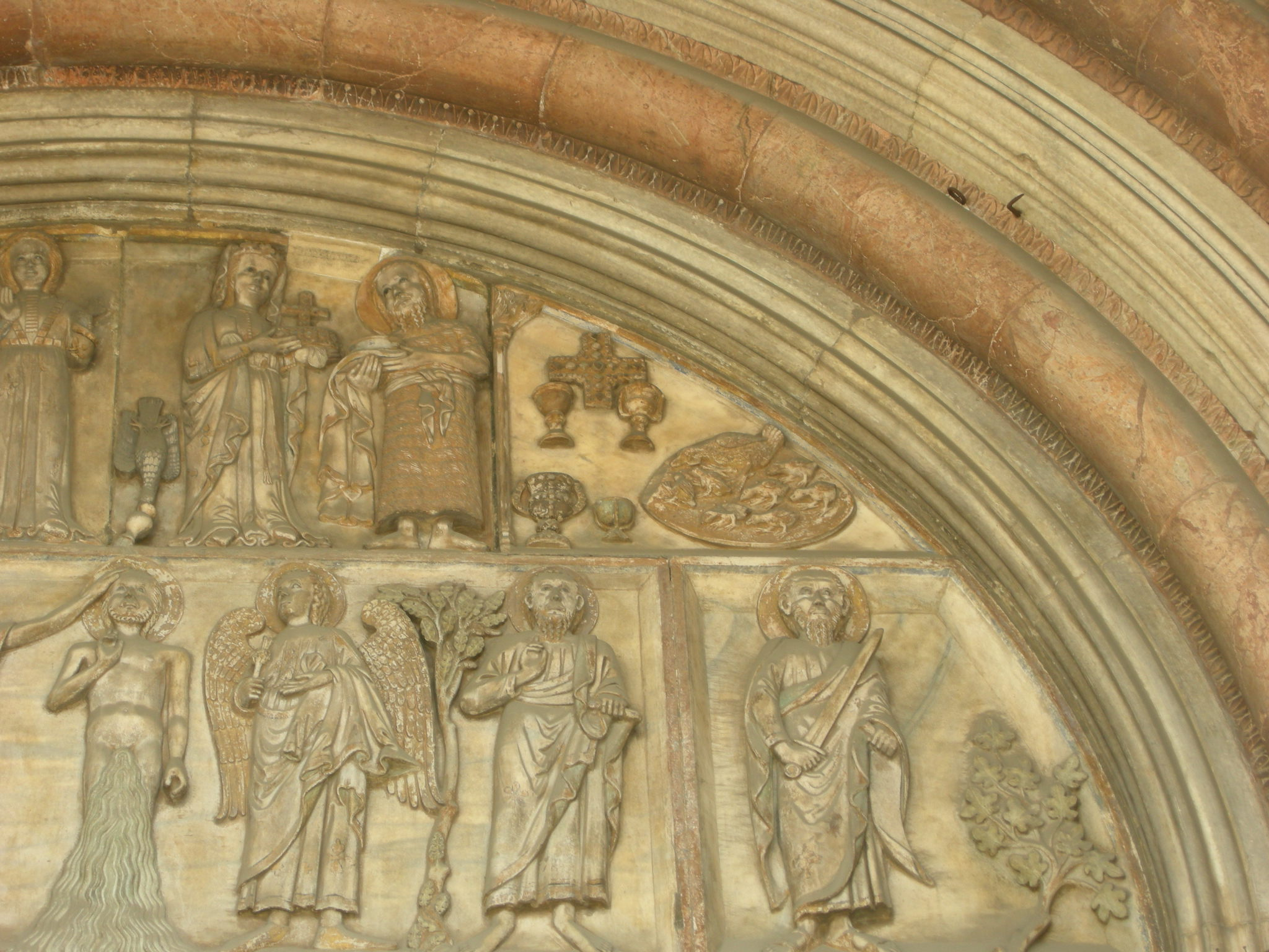 Portale del duomo di monza